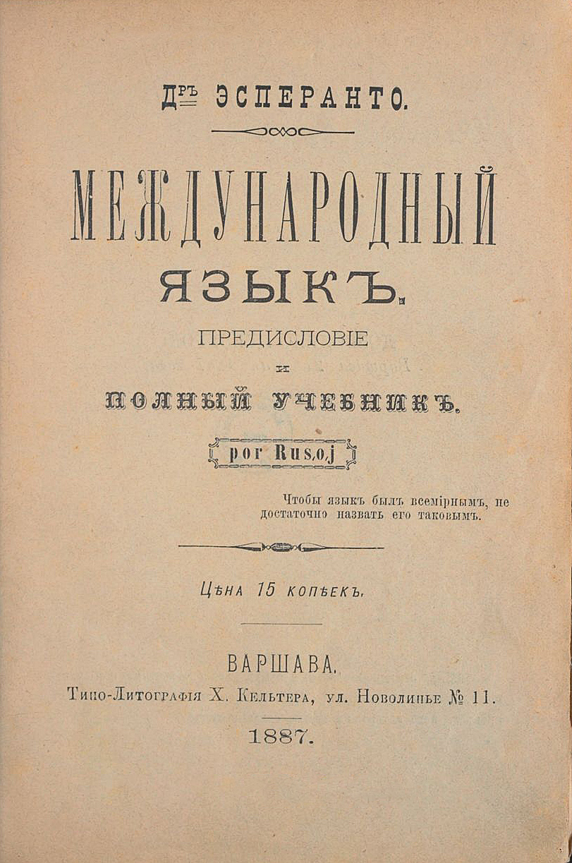 Kovrilo de la Unua Libro por Rusoj